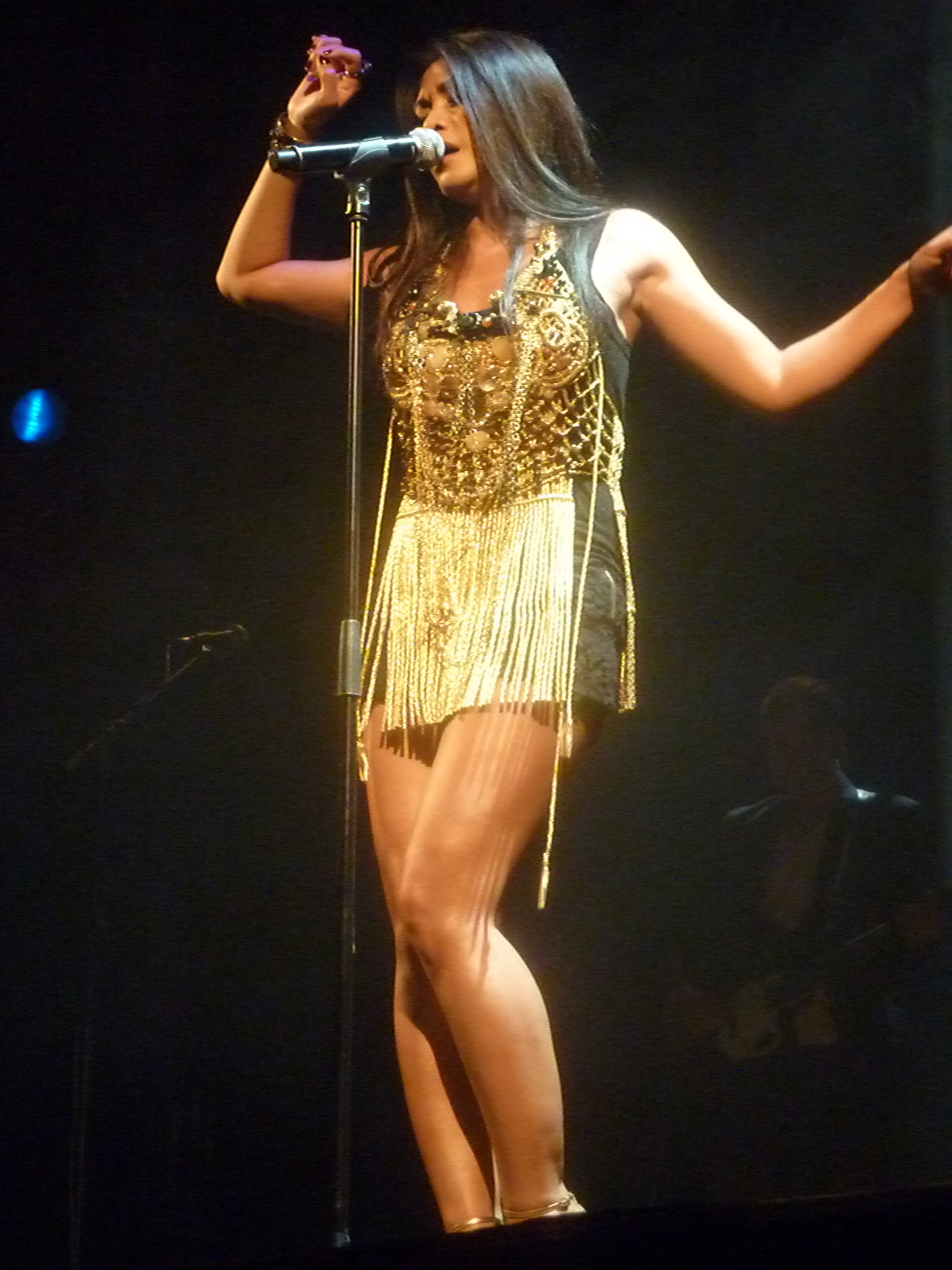 La chanteuse Anggun en concert au Trianon à paris en juin 2012